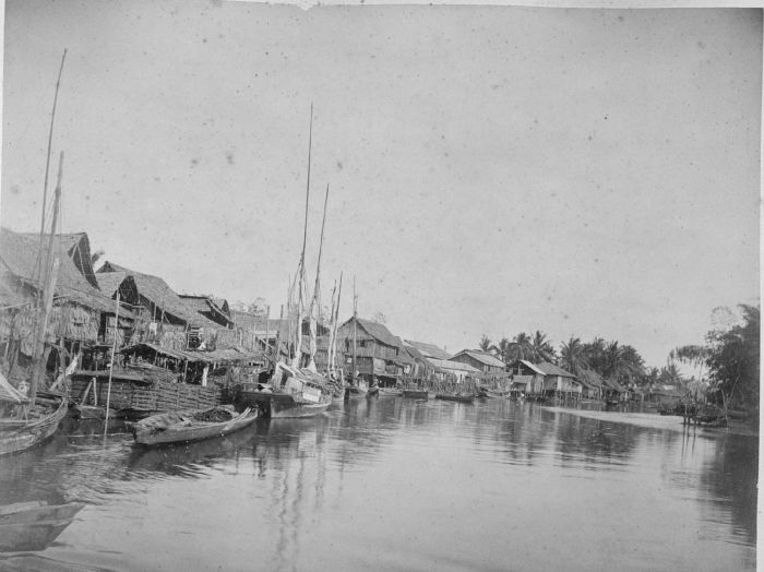 Foto. Kampong Laboean Deli aan de Deli rivier.